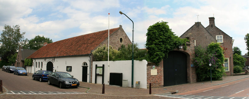 Het poortgedeelte van de brouwerij sluit aan tegen de zijgevel van een kleine teruggerooide rechthoekige aanbouw van het woonhuis.